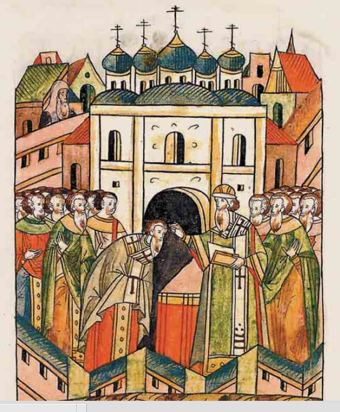 Митрополит Зосима рукополагает 18 ноября 1490 года игумена Авраамия в епископа Коломенского. Лицевой летописный свод Книга 17 стр. 140